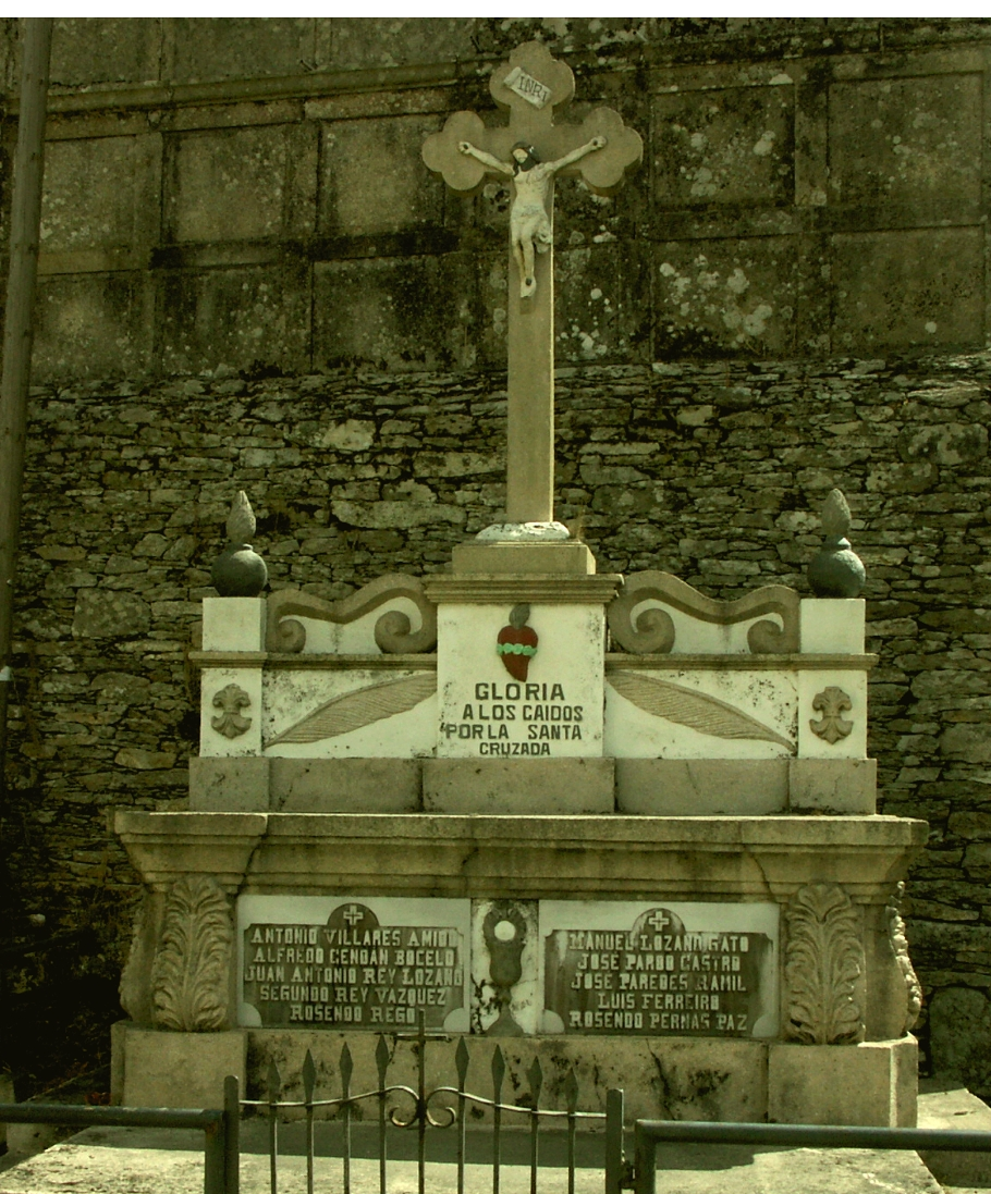 Denkmal für Gefallene auf faschistischer Seite - Goiriz, Prov. Lugo, Spanien